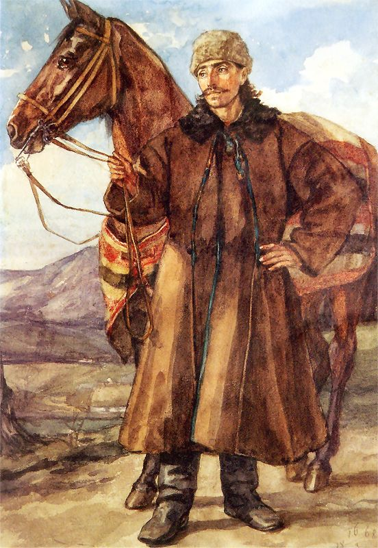 Палагичі — село Тлумацького району Івано-Франківської області. Stajenny Iwan i koń Dickyt. Z cyklu Album Pałahickie. 1868. Akwarela na papierze. 23 x 32 cm. Muzeum Lubuskie w Gorzowie Wielkopolskim. Українець. Ukrainian